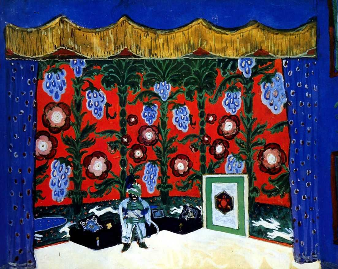 Бенуа Александр Николаевич. "Эскиз декорации к Золотому петушку" Бенуа Александр Николаевич. Комната Черномора. Эскиз декорации к «Петрушке» И.Стравинского. 1911